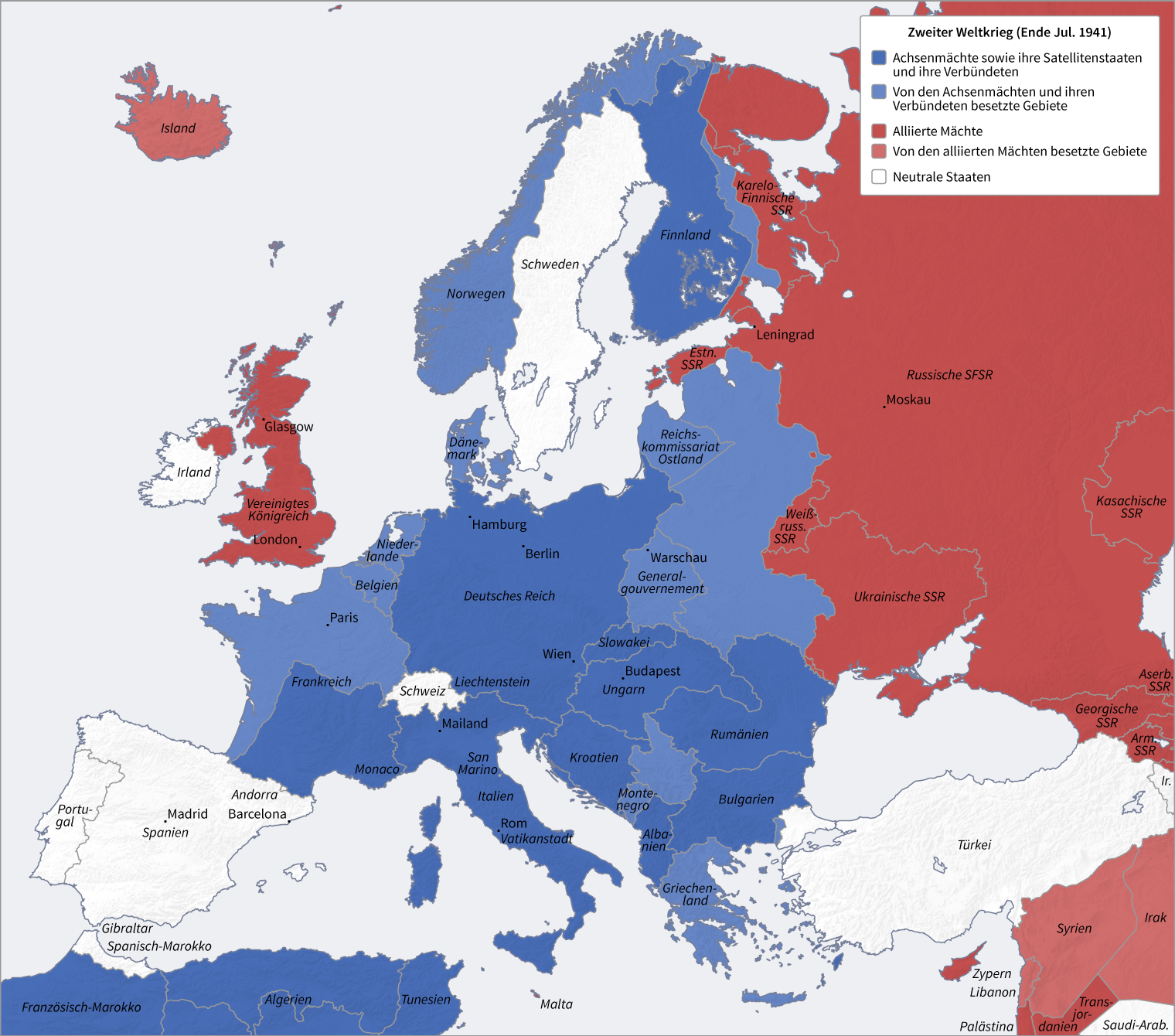 Zweiter Weltkrieg (Ende Jul. 1941)